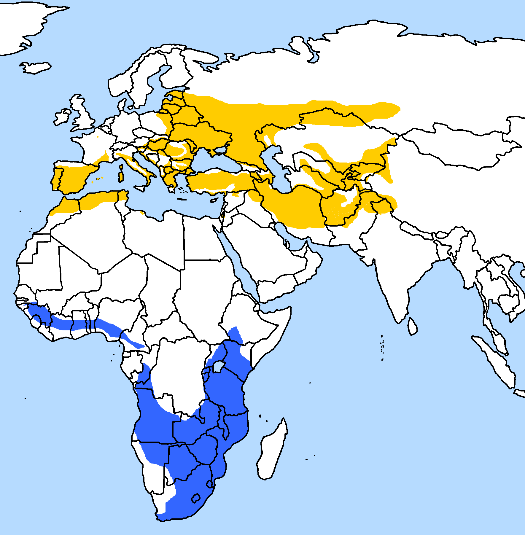 main source: Beaman/Madge: Handbuch der Vogelbestimmung. Eugen Ulmer- Stuttgart. S.527 made by Scops 10:57, 5 March 2006 (UTC)